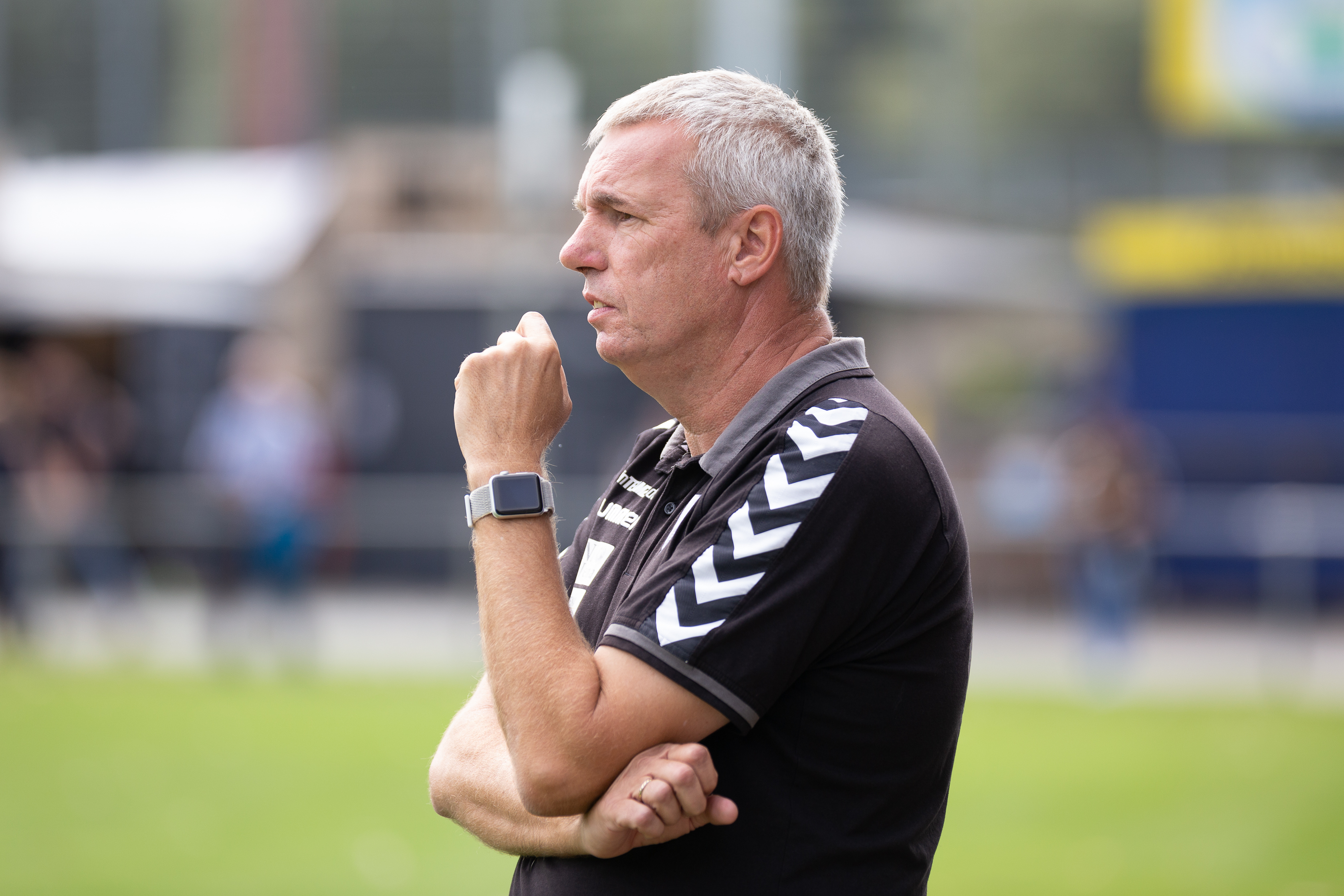 Fußball, DFB-Pokal Frauen, FF USV Jena - FC Bayern München; Steffen Beck (FF USV Jena, Trainer, Coach); Porträt, Einzelbild an der Seitenlinie